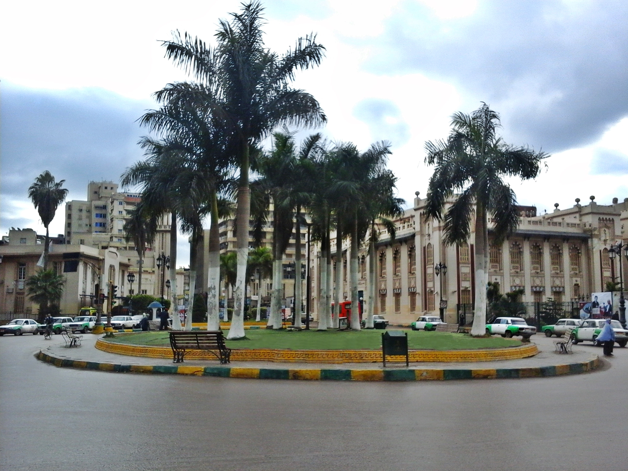 ميدان الأوبرا ودار أوبرا دمنهور، دمنهور، مصر.